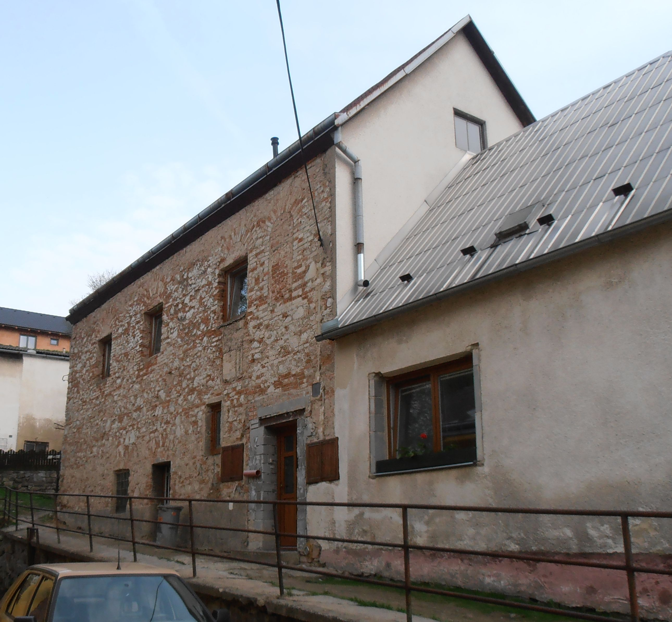 Bývalá synagoga v Puklicích.